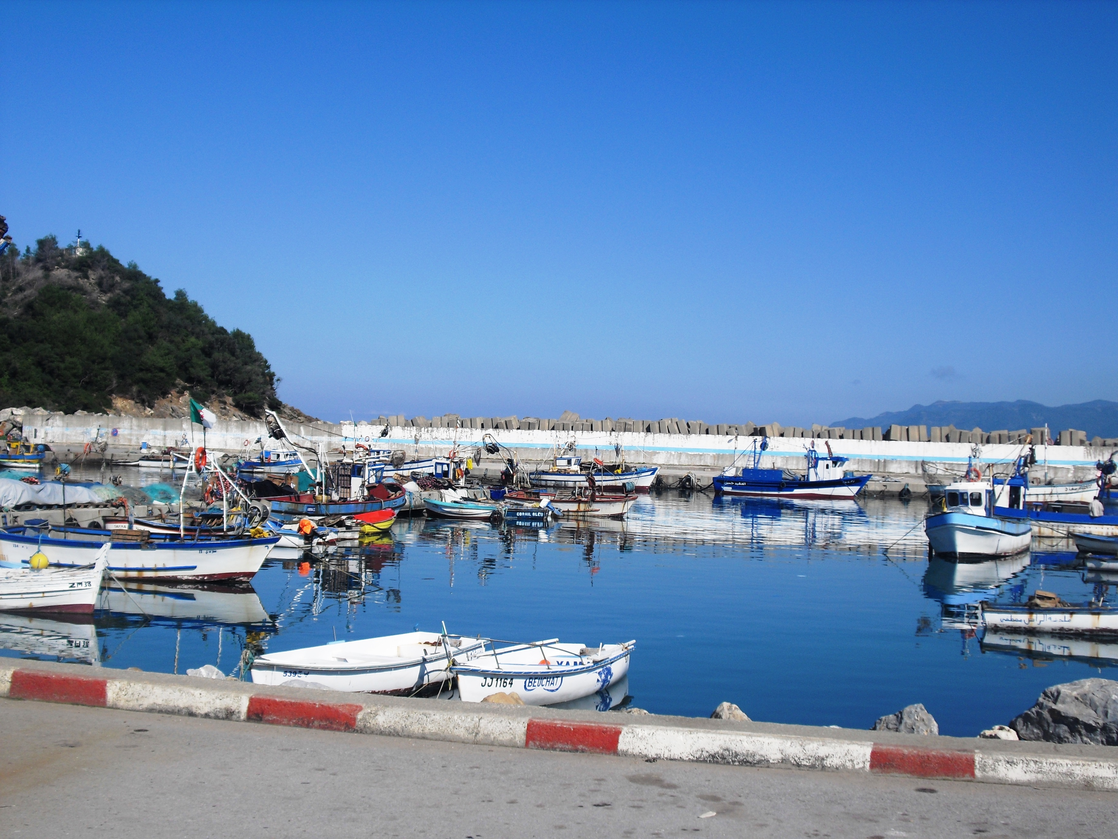 port de peche de mansouria à la commune de ziama mansouria (Jijel - Algérie) photo prise par mon appareil en avril 2011